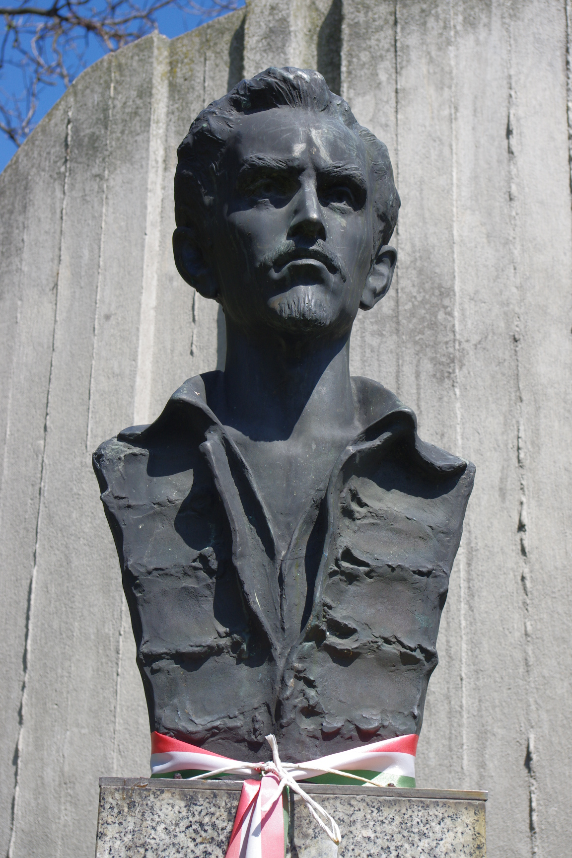 Pomnik Sándora Petőfiego w Tarnowie